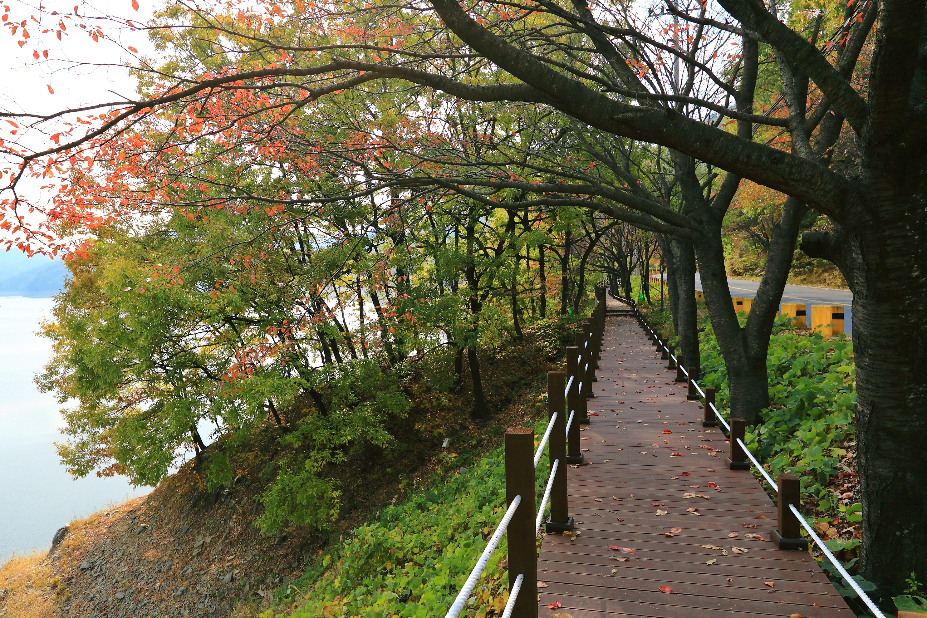 대청호오백리길 1구간_6